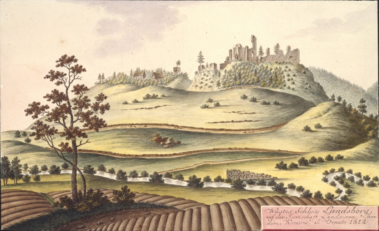 Lanšperk (hrad). Wüstes Schloss Landsberg auf der Herrschaft Landscron, Chrudim. Kreises. J. Venuto 1812